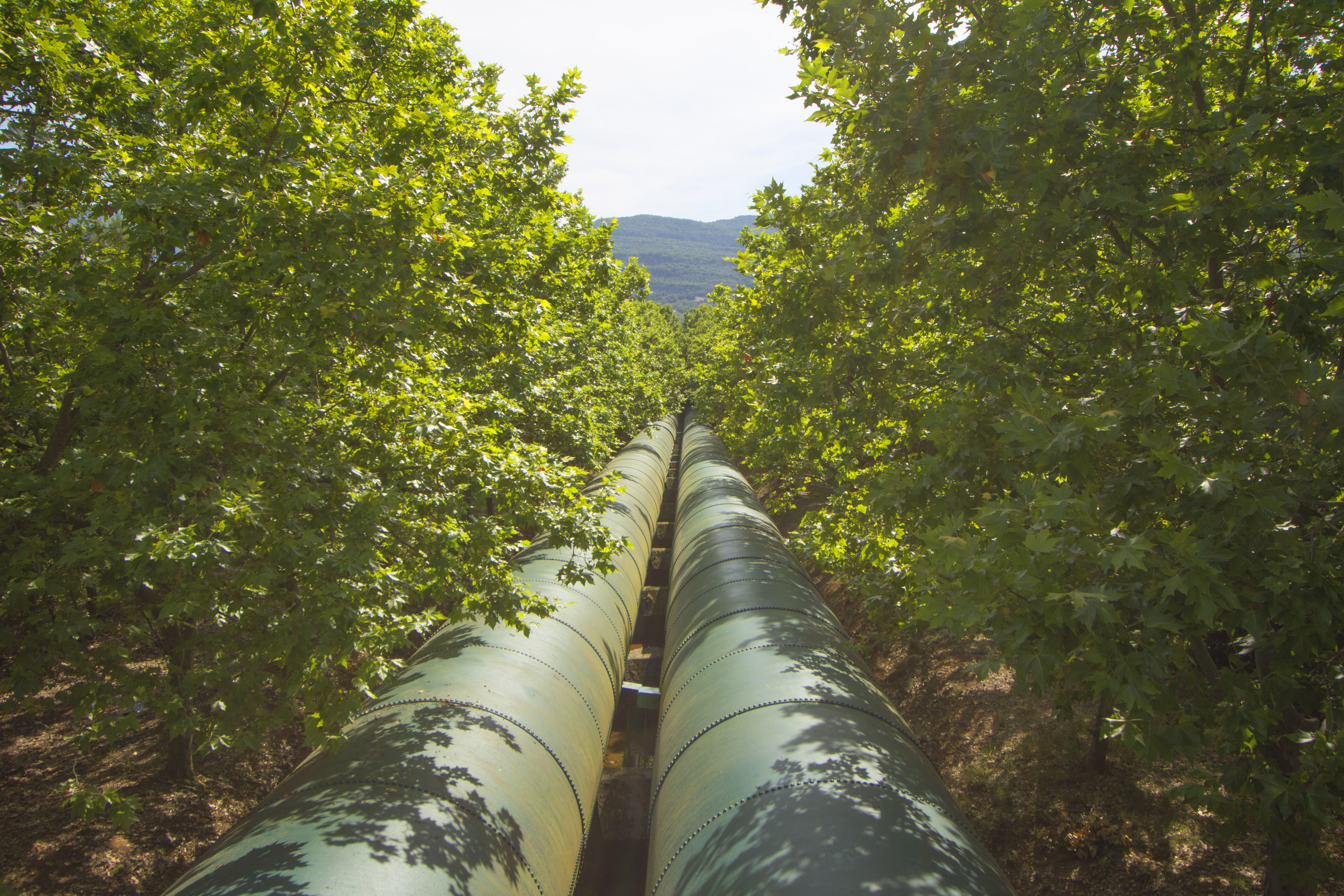 Canonada forçada de la central hidroelèctrica de Reculada (Pallars Jussà)